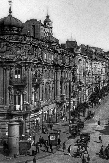 Хмарочос Гінзбурга у Києві